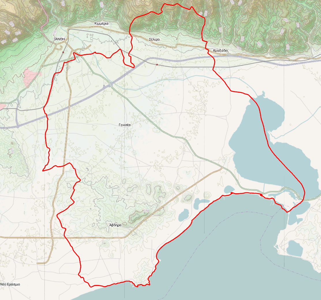 Τοπογραφικός χάρτης του Δήμου Αβδήρων.